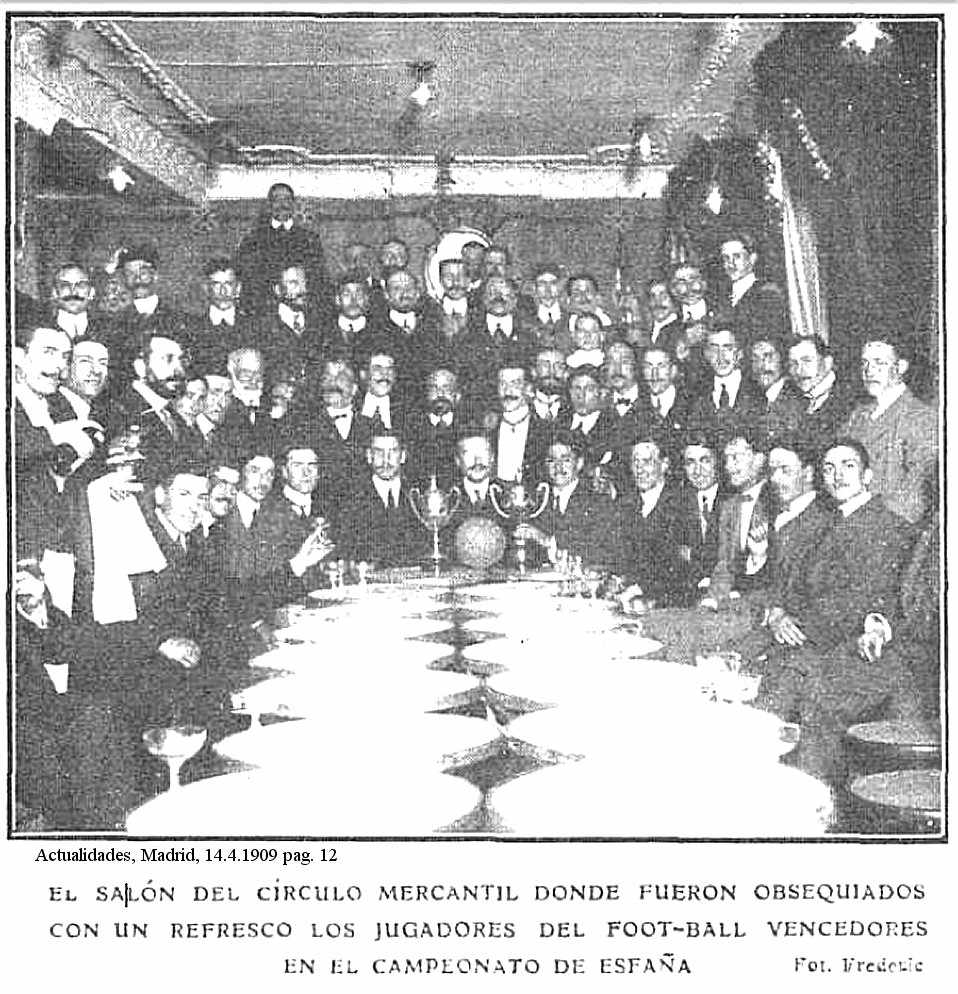 Fotografia dei giocatori di foot-ball, vincitori del campionato di Spagna, durante il rinfresco offerto in loro onore nel salone del Círculo de la Unión Mercantil e Industrial di Madrid.